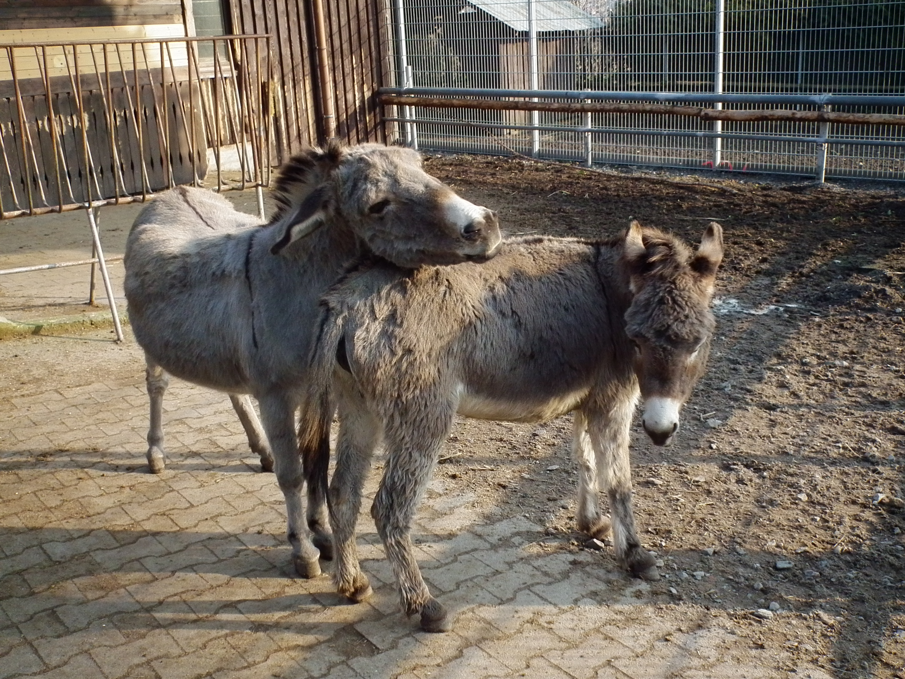 Hauseselhengst (Equus asinus) beim Versuch, eine Stute zu decken, die vor vier Wochen ein Fohlen bekommen hat, fotografiert im Letzenberg Tierpark Malsch (Baden-Württemberg, Deutschland)